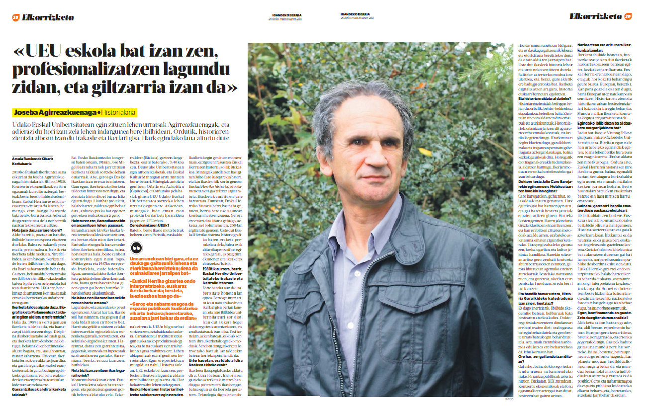 Elkarrizketa Joseba Agirreazkuenaga historialariarekin, Euskadi ikerkuntza-saria esleitu eta gero.